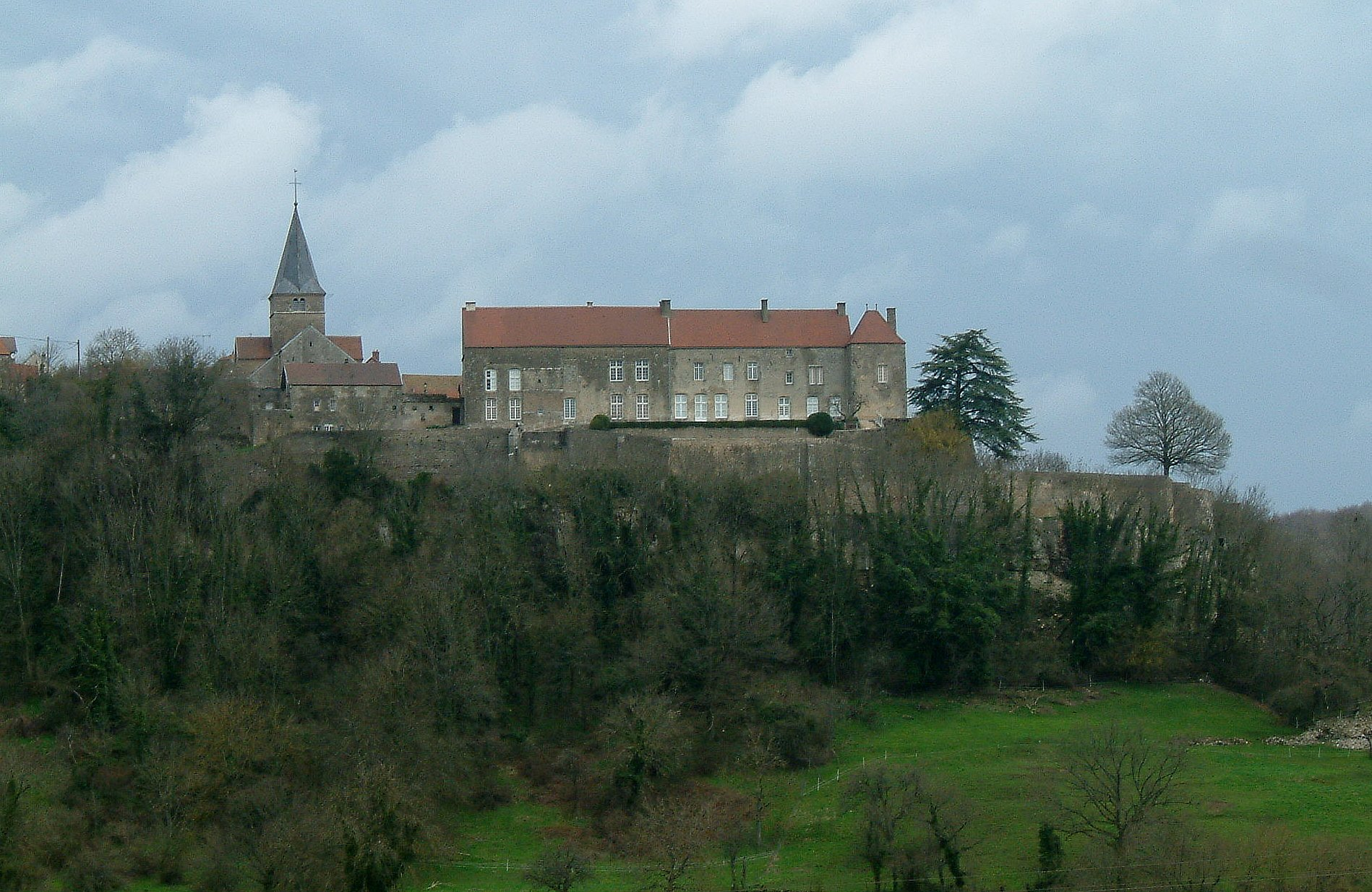 Frolois : vue du Câteau et de l'église.